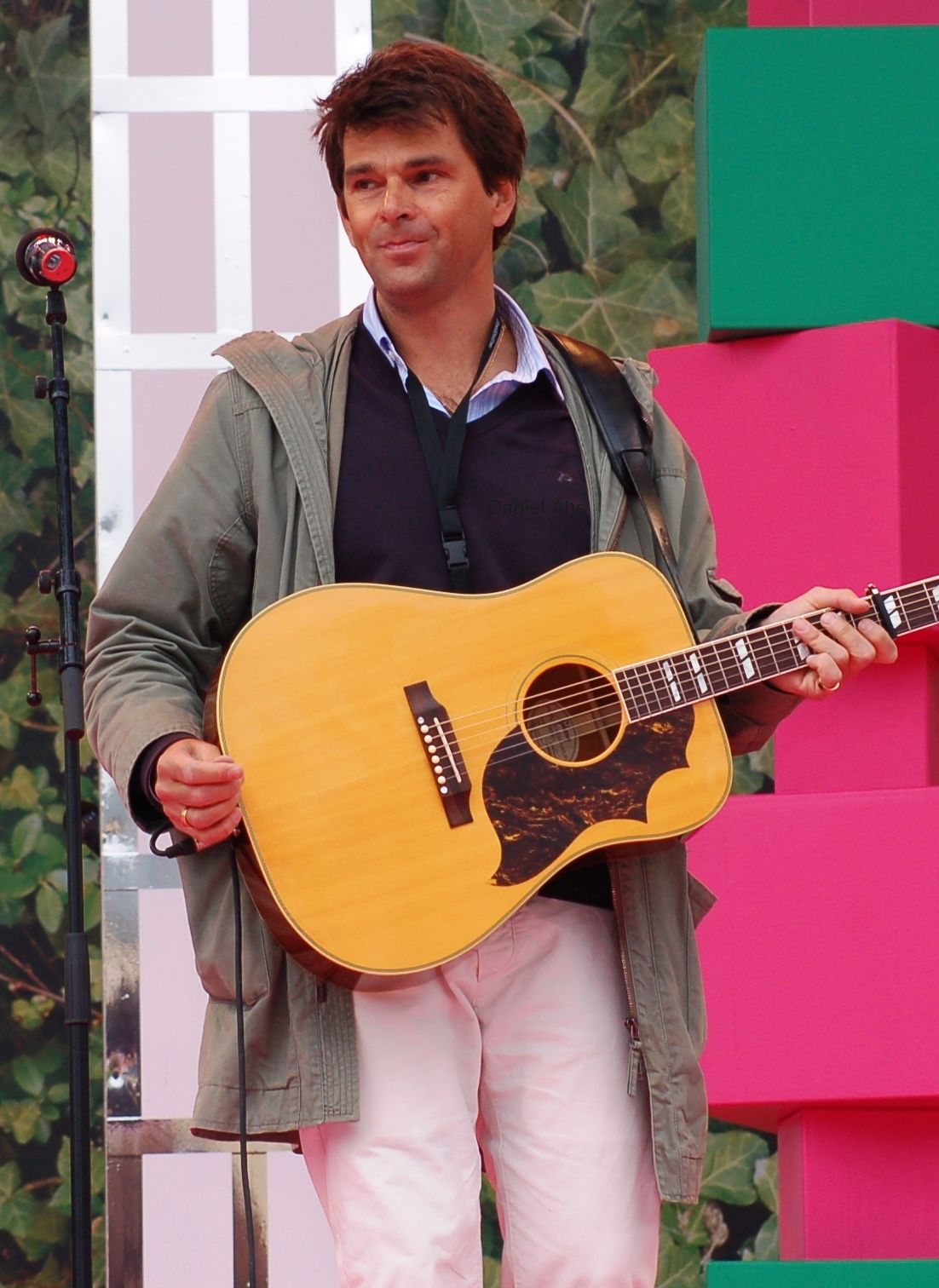 Niklas Strömsdt På Sommarkrysset 2008(Gröna Lund)